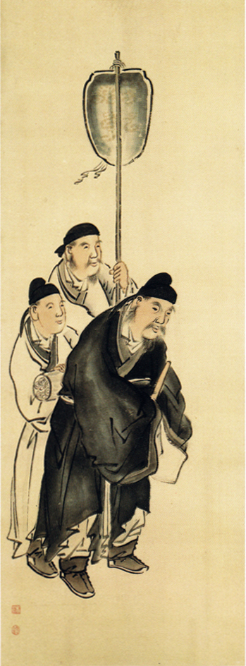 中井藍江「人物図」 関西大学所蔵